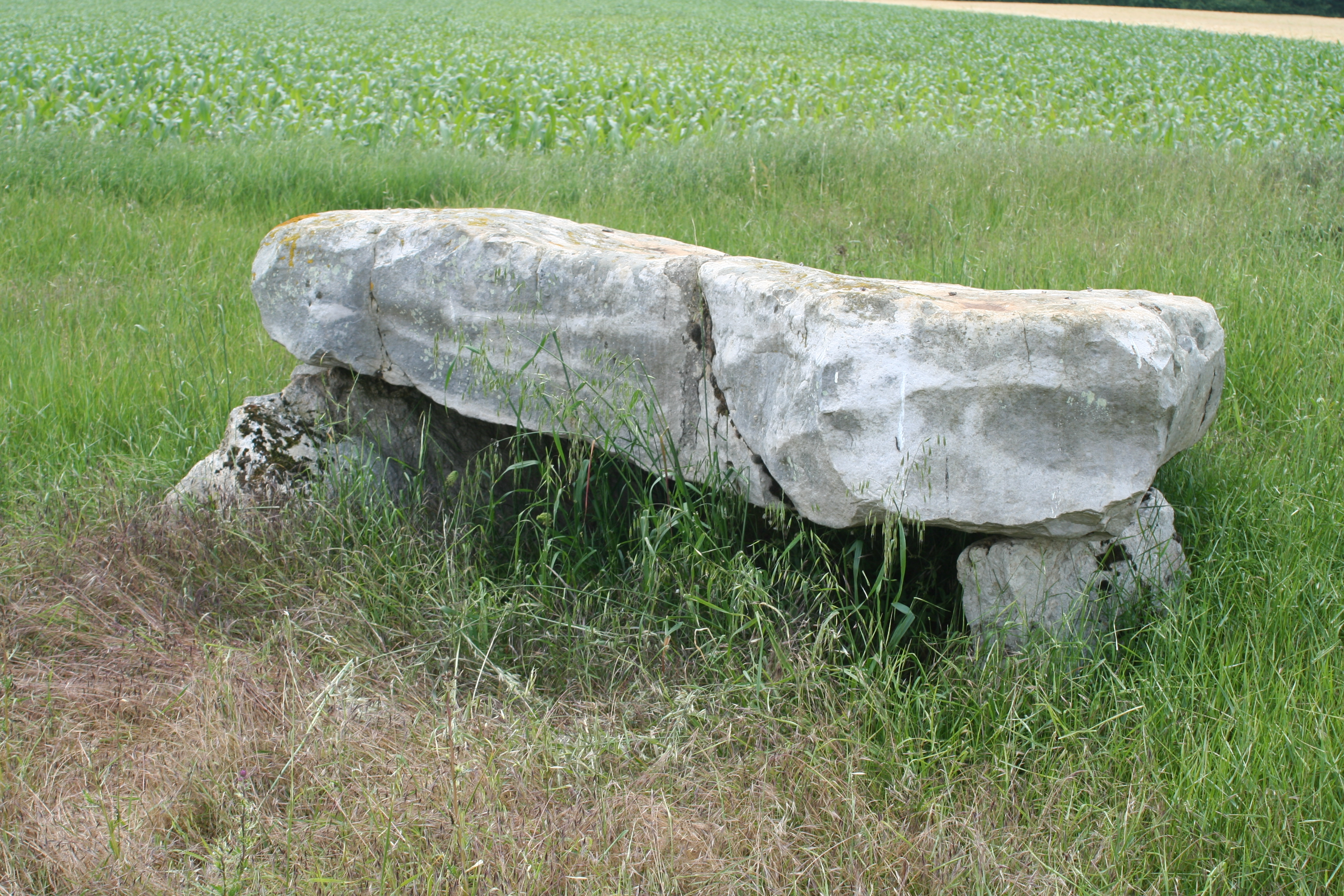 Le dolmen situé sur la commune de Congerville-Thionville